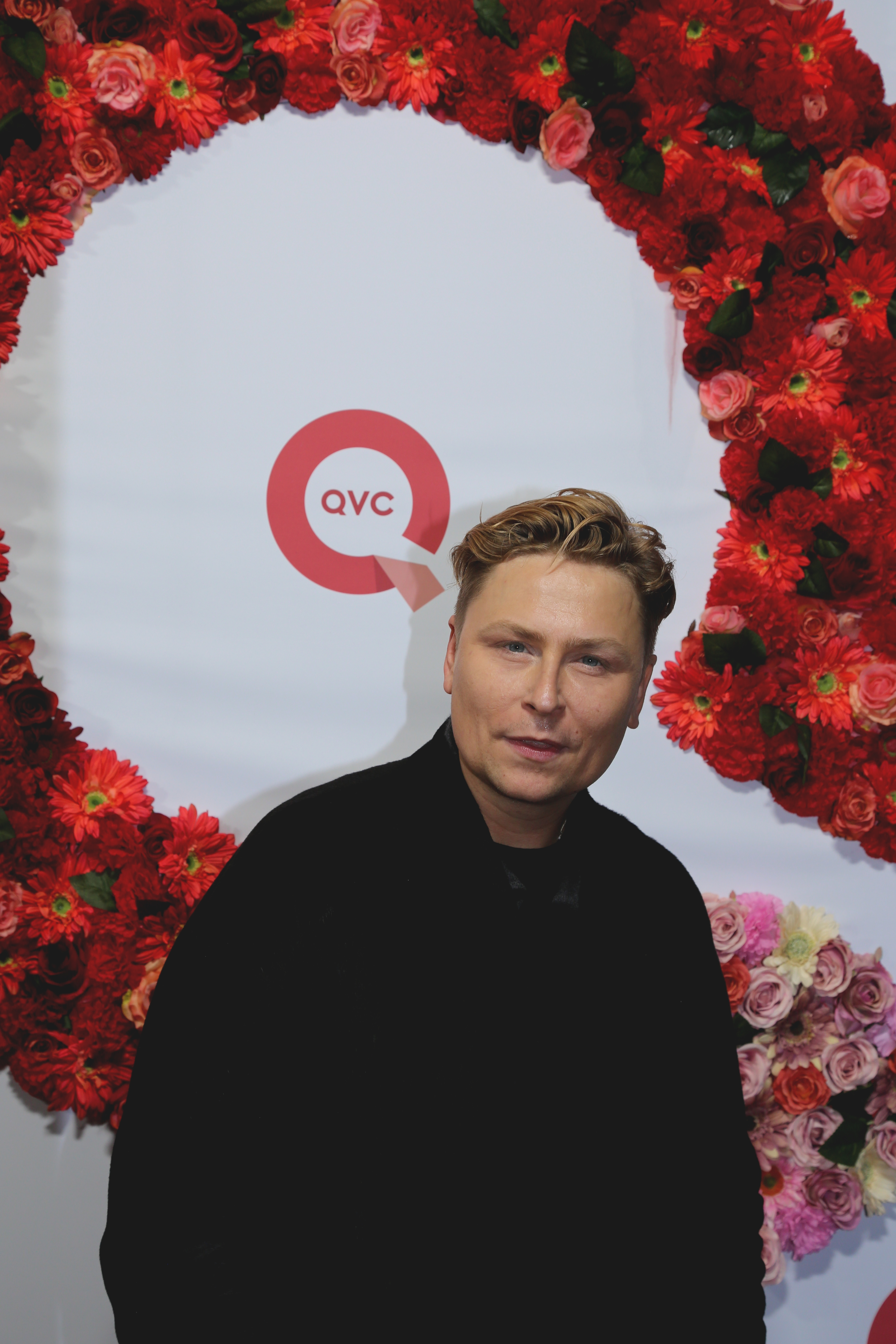 Dawid Tomaszewski beim QVC Fashion-Event zur "VOGUE Fashion's Night Out", am 08.09.2017 in Düsseldorf.